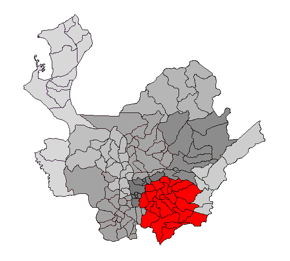 Ubicación de la región Oriente en el departamento de Antioquia